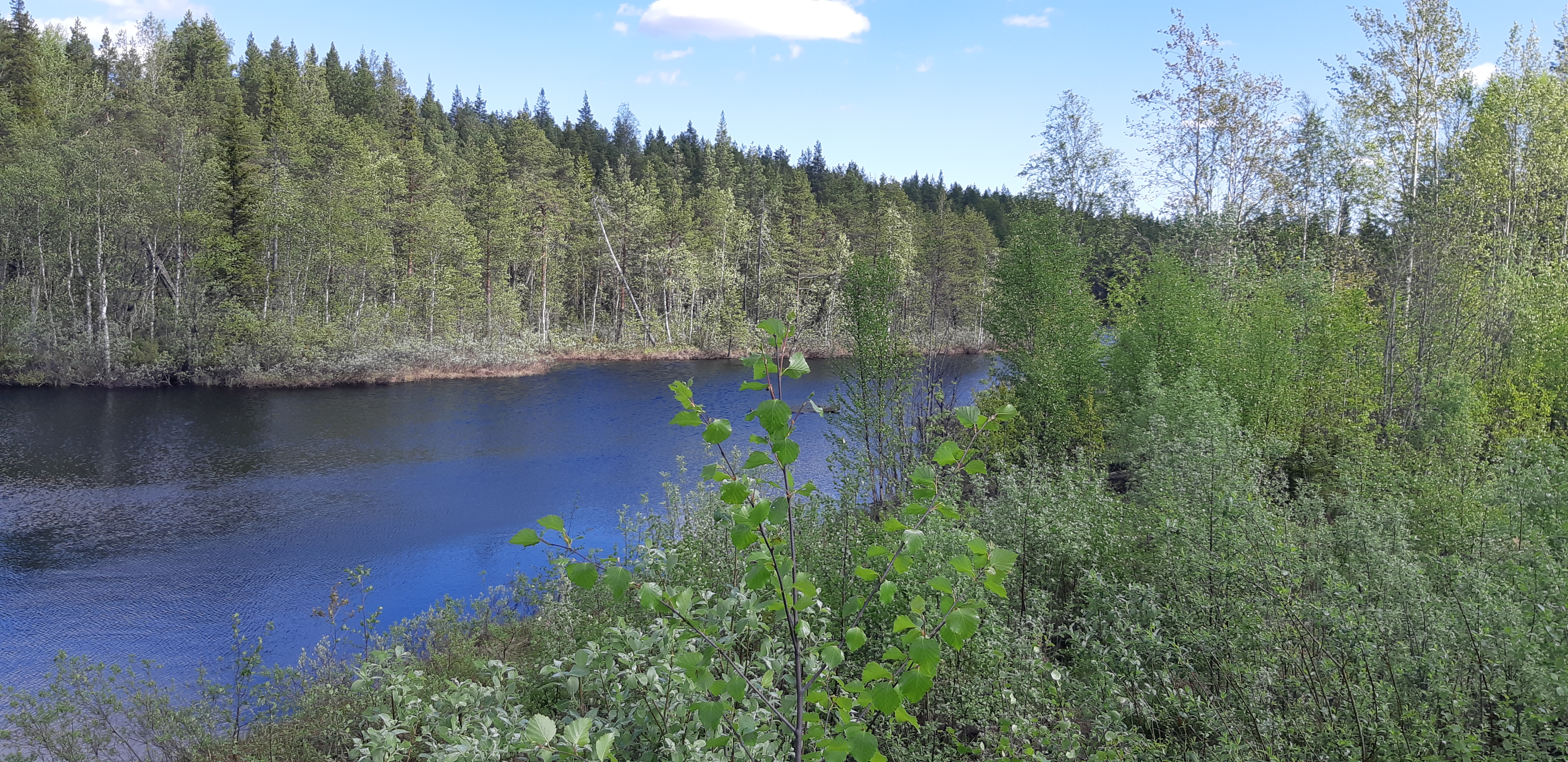 оз. Топорное